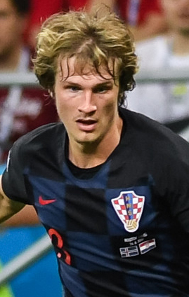 Сборная Исландии уступает Хорватии и покидает ЧМ-2018